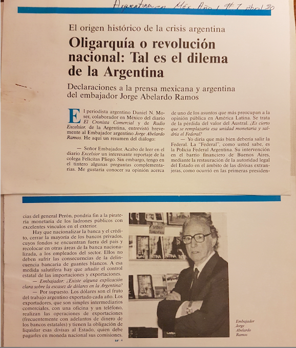 Homenaje a Abelardo Ramos